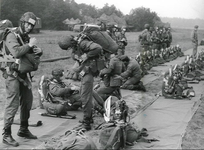 Soldaten der 2. Fallschirmjägerkompanie des Luftsturmregiments 40 legen vor dem Sprung bei der Übung JUG, ihre Fallschirmgeräte an